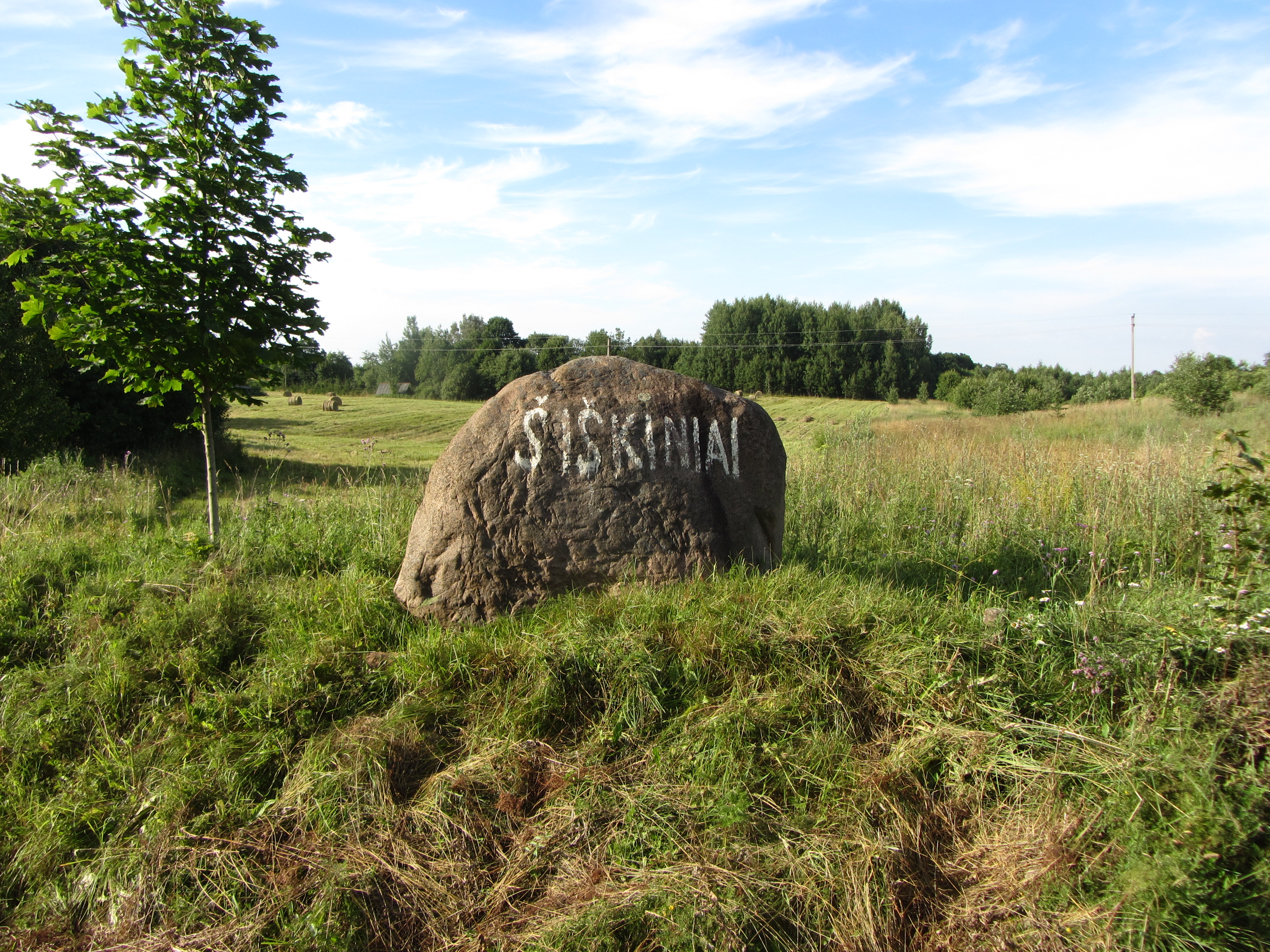 Linkmenų sen., Lithuania